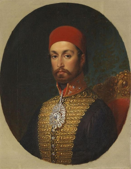 Porträt des osmanischen Sultans Abdul Medschid (Abdülmecid I.), 1846